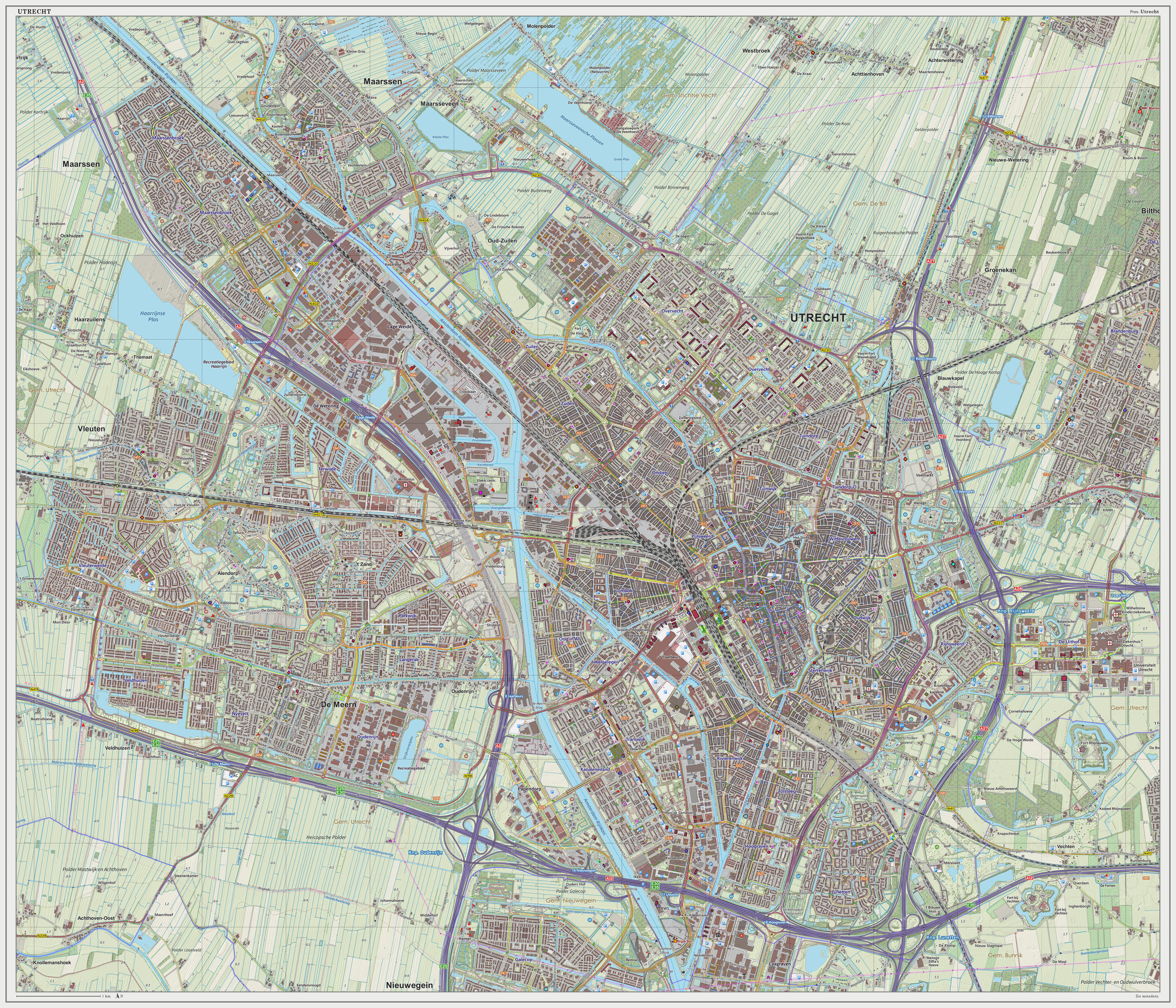 Topografische kaart van Utrecht (woonplaats). Resolutie: 300 pixels/km. Kaartbeeld samengesteld uit de open geodata van de Top10NL en Top25namen (Basisregistratie Topografie, Kadaster), Creative Commons BY licentie. Gebouwvlakken uit open geodata BAG extract. Wegen uit de OpenStreetMap. Reliëfschaduw uit de Actuele Hoogtekaart AHN2. Samenstelling en kleurenschema: Jan-Willem van Aalst, met QGIS2. Zie ook de Legenda.